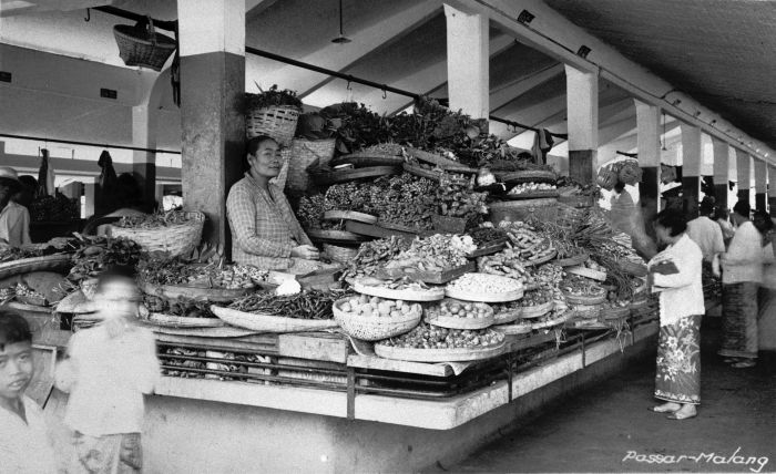 Foto. Een marktkraam met groente op de Pasar te Malang, Oost-Java.